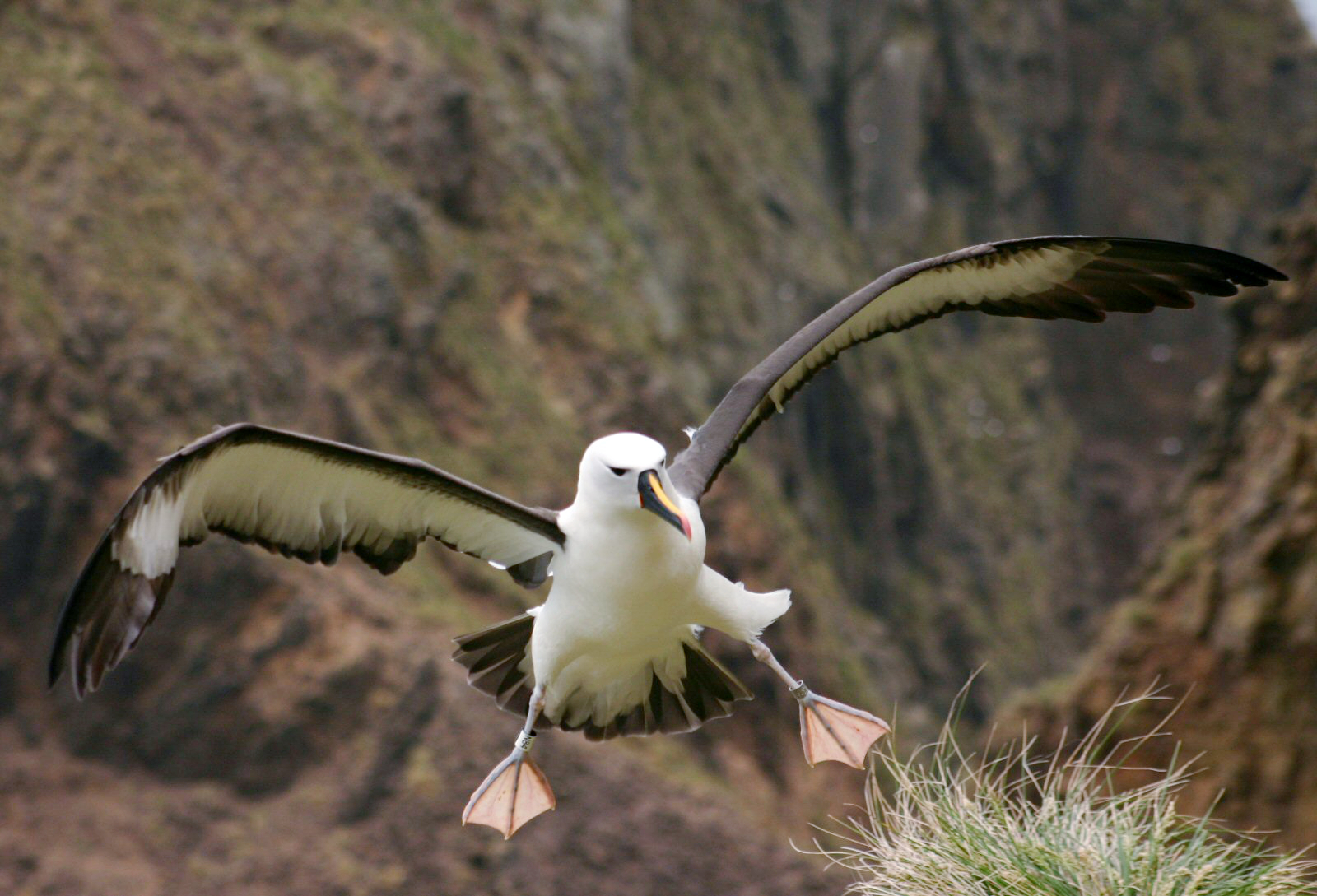 Albatros à bec jaunes